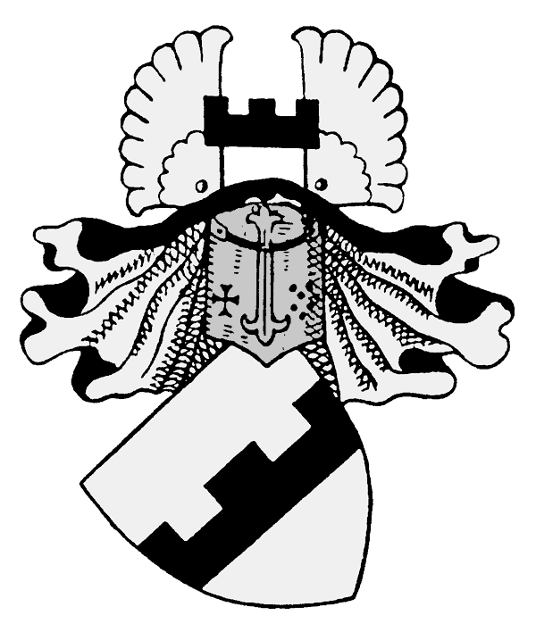 Stammwappen der Familie von Wrangel